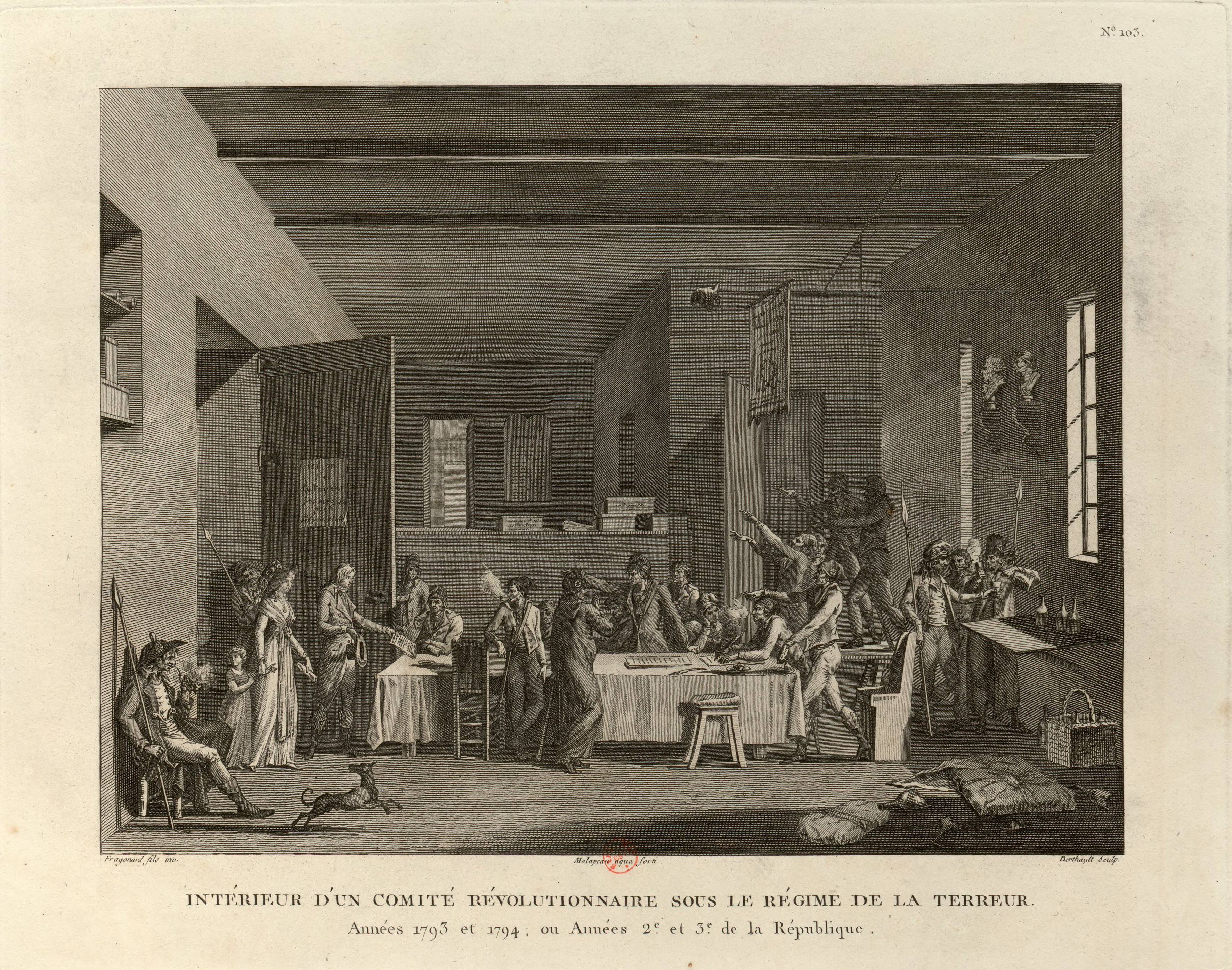 Comité de surveillance révolutionnaire sous la Terreur, 1793-1794. Tableau nº 103, extrait de la Collection complète des tableaux historiques de la Révolution française.